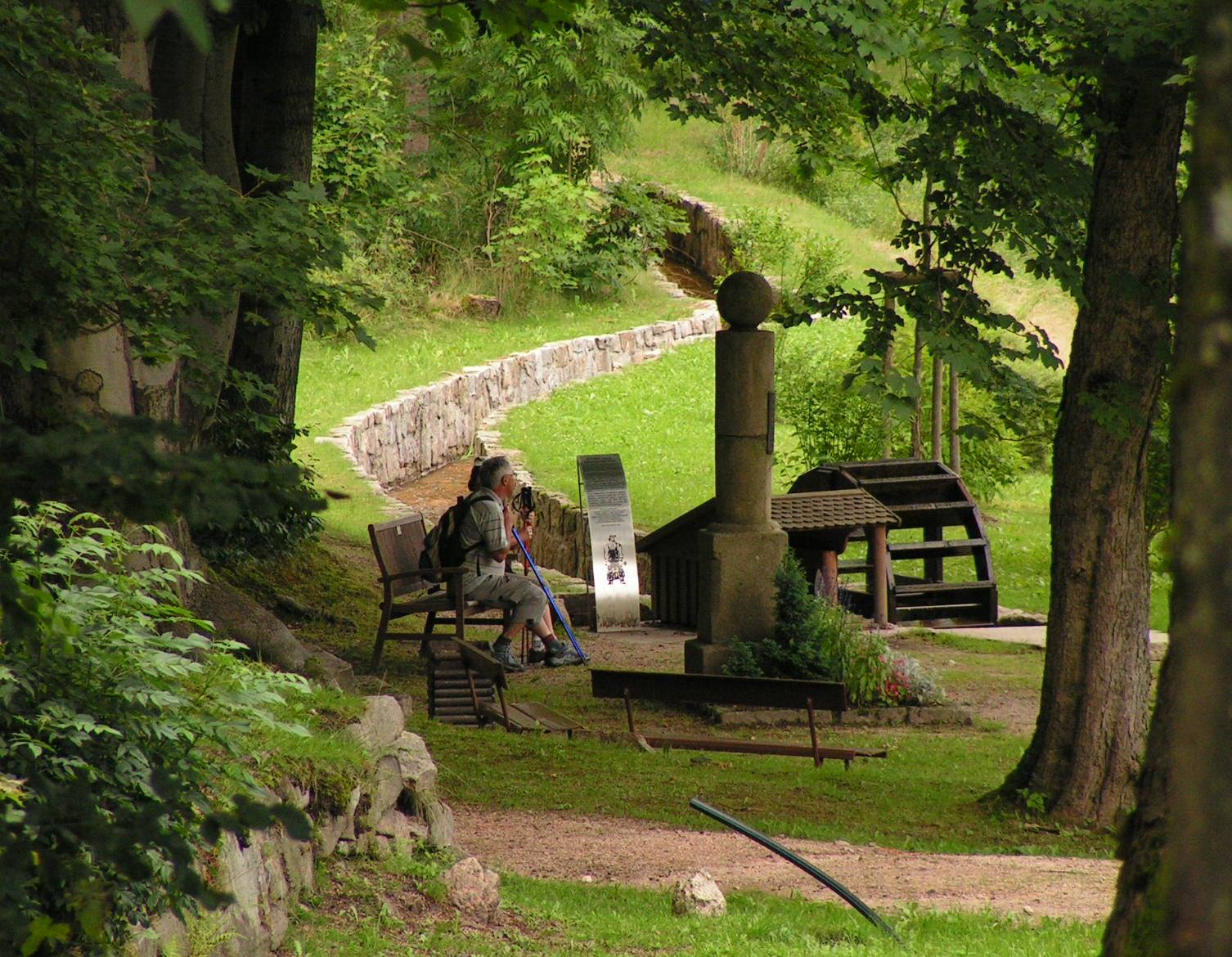 Delitsch-Gedenkstein am Grüner Graben im Park von Wildenthal, Stadt Eibenstock, errichtet 1907